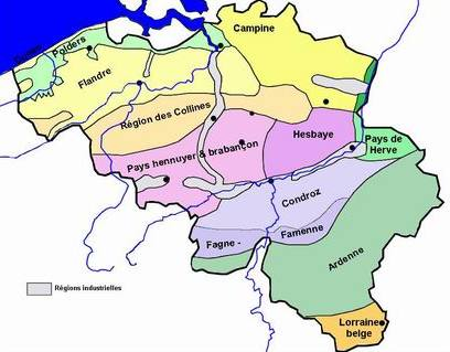 Régions naturelles de Belgique